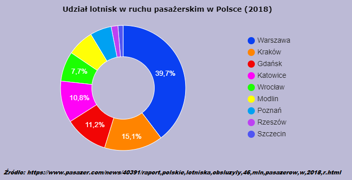 Wykres kołowy ilości pasażerów na lotniskach w Polsce w 2018r.